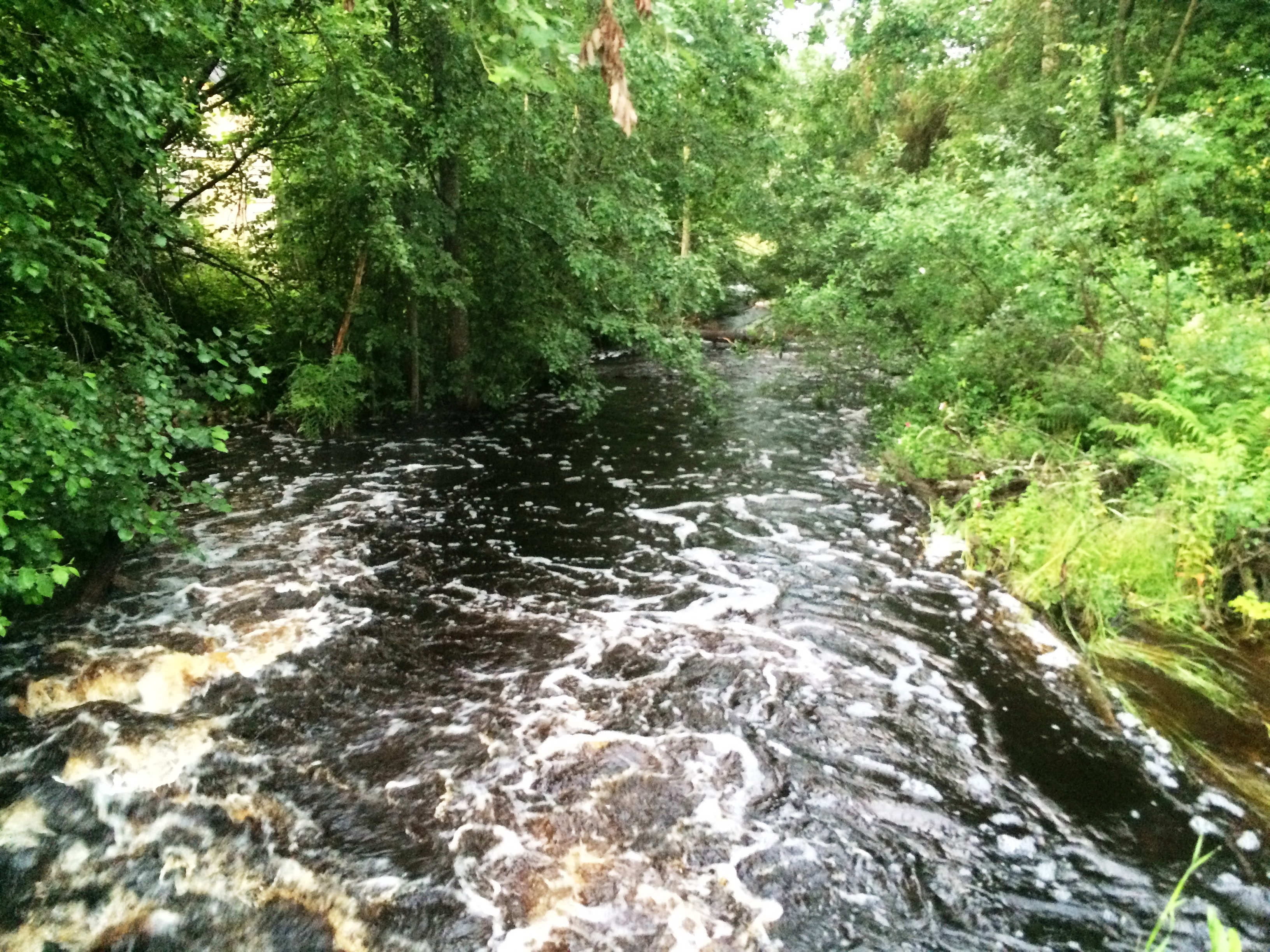 Аурайоки (река, впадает в Ладожское озеро)